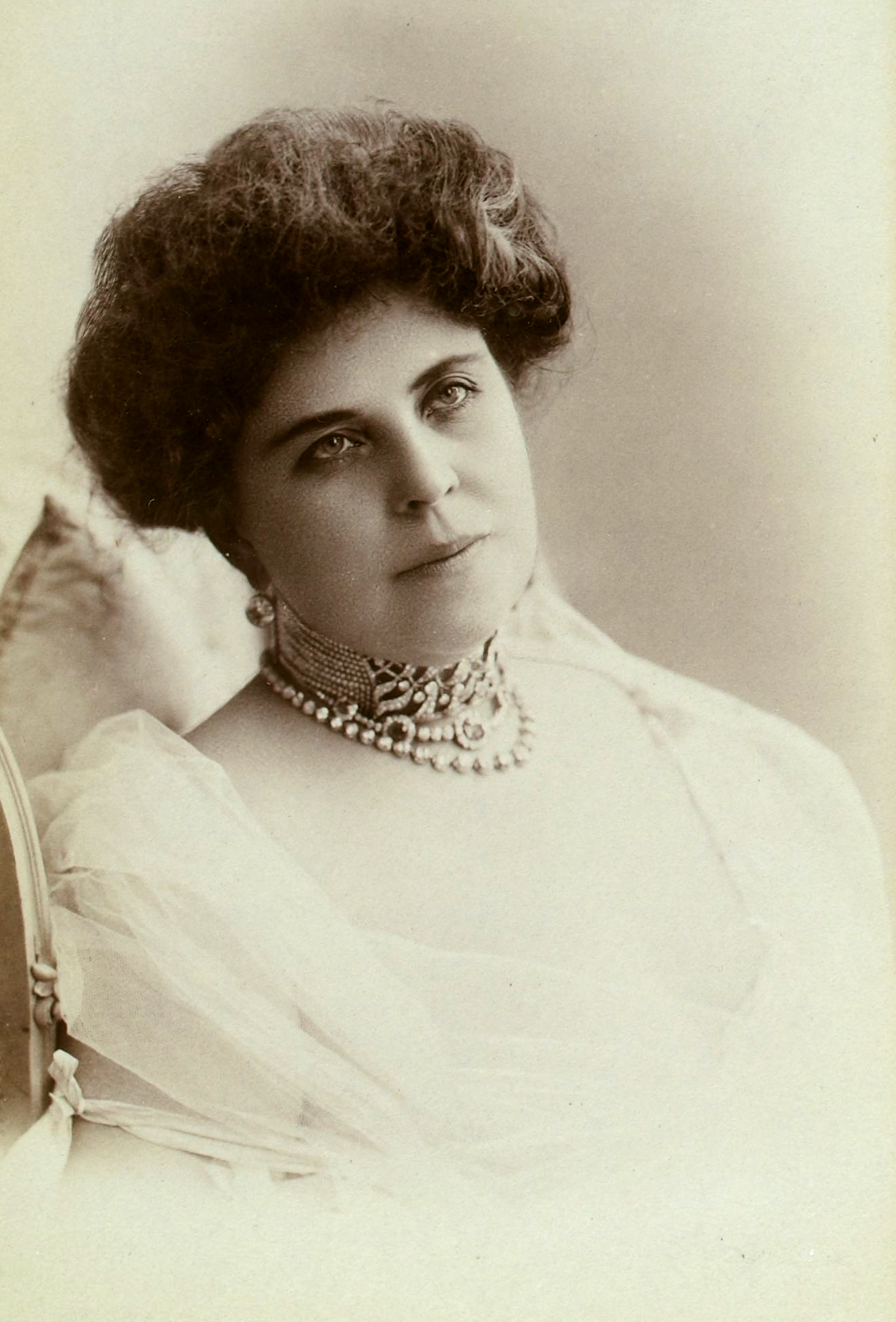 Album Reutlinger de portraits divers, vol. 21 : [photographie positive] : Agnès Freund.